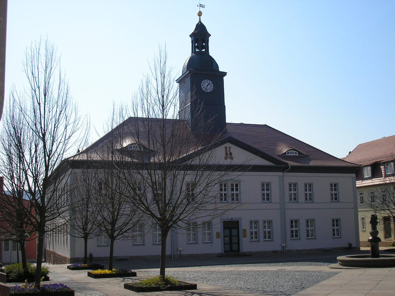 Das Rathaus in Bad Frankenhausen (Thüringen)